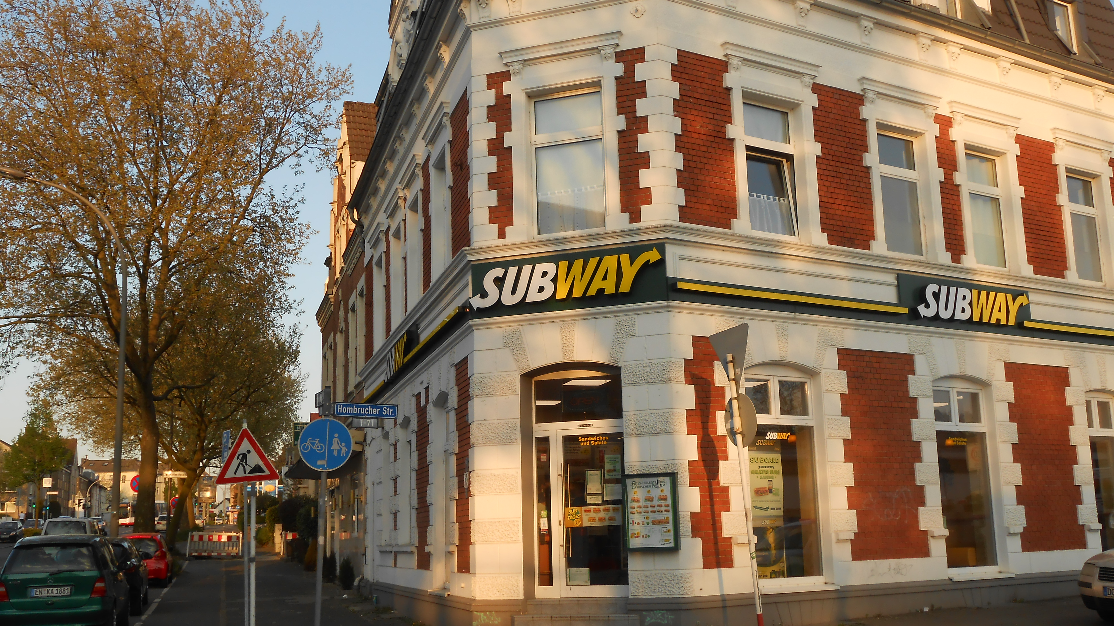 Filiale der Subway Fast-Food-Kette in Dortmund-Hombruch.